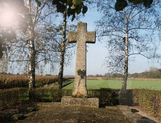 Ehrenmal Panzergraben bei Memprechtshofen im Jahre 2006